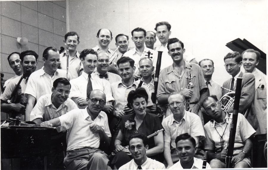 פאול בן-חיים (שורה שנייה מלמטה, ראשון משמאל) עם תזמורת קול ישראל (מס' קטלוגי: MUS 055 / M75)